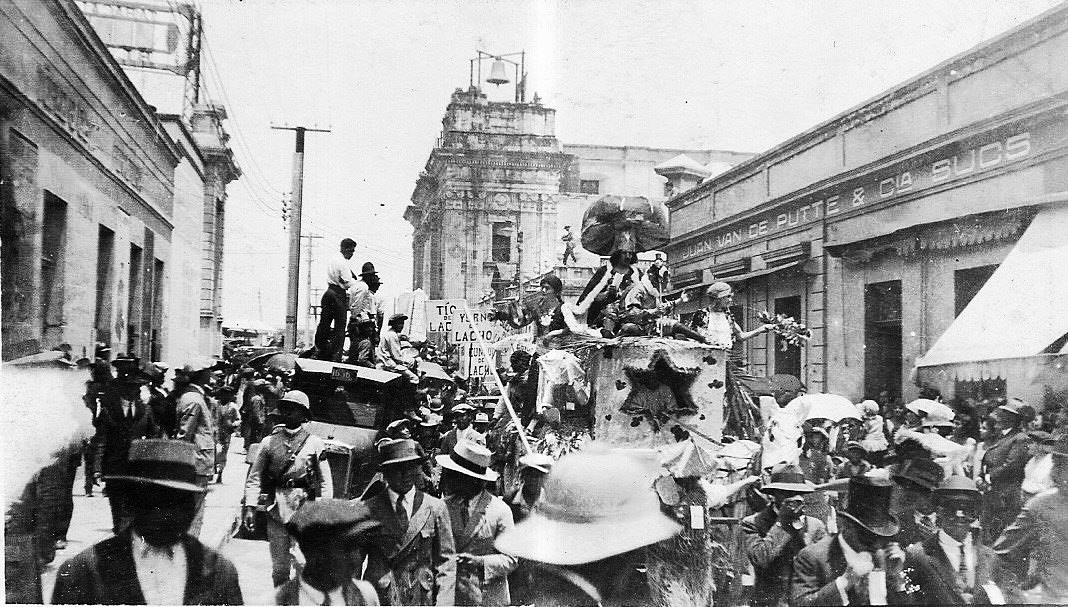 Huelga de Dolores de 1927. Obsérvese el campanario temporal de la Catedral y las pancartas burlescas contra el presidente Lázaro Chacón.